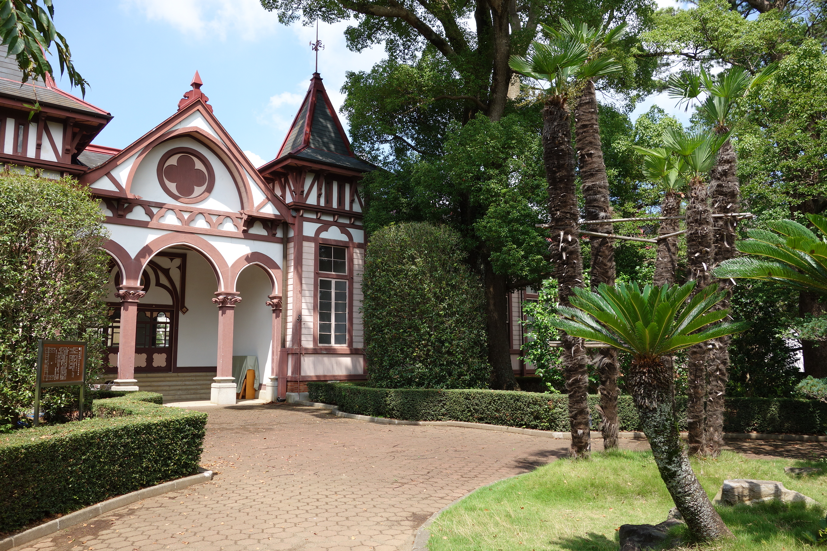 土浦一高-旧校舎